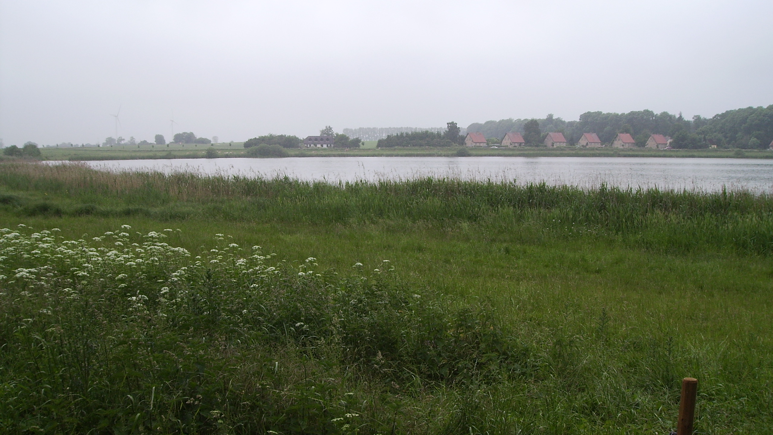 Søby Sø, Nørre Søby Sogn, Åsum Herred, Odense Amt, Denmark (Danish Lake) - Søby Sø fra øst